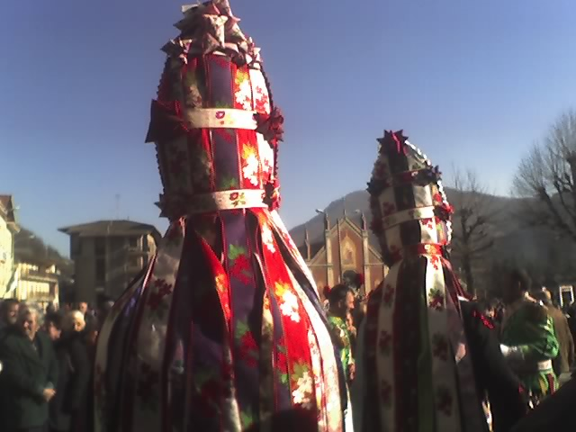 foto mia pesonale,Baìo 2007